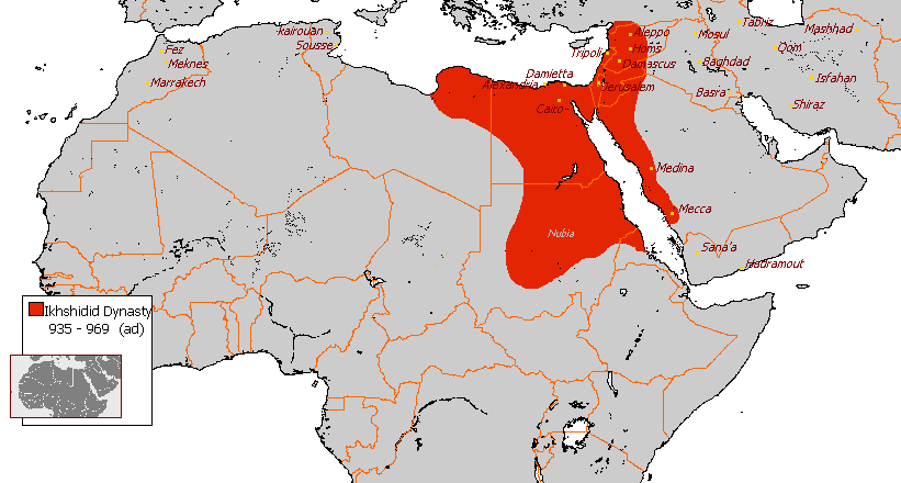 Ikhshidid Dynasty 935-969 (AD)